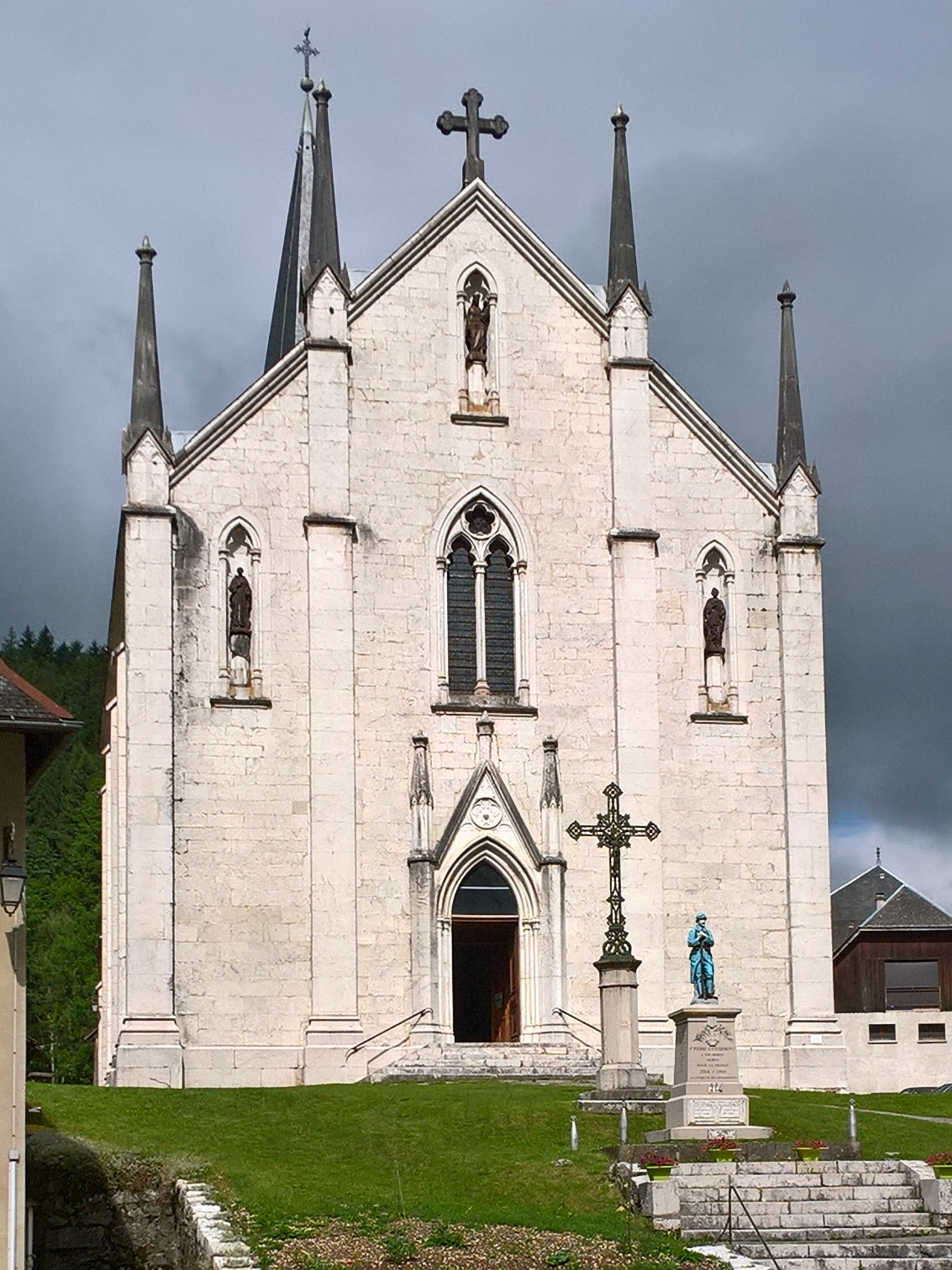 Saint-Pierre-d'Entremont (Isère), façade de l'église.